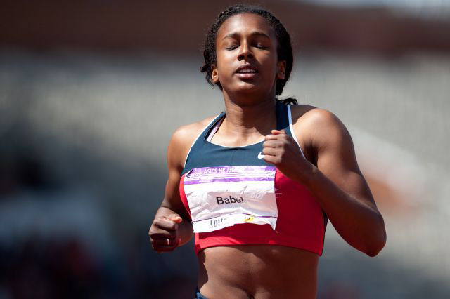 Janice Babel tijdens de NK senioren in 2012